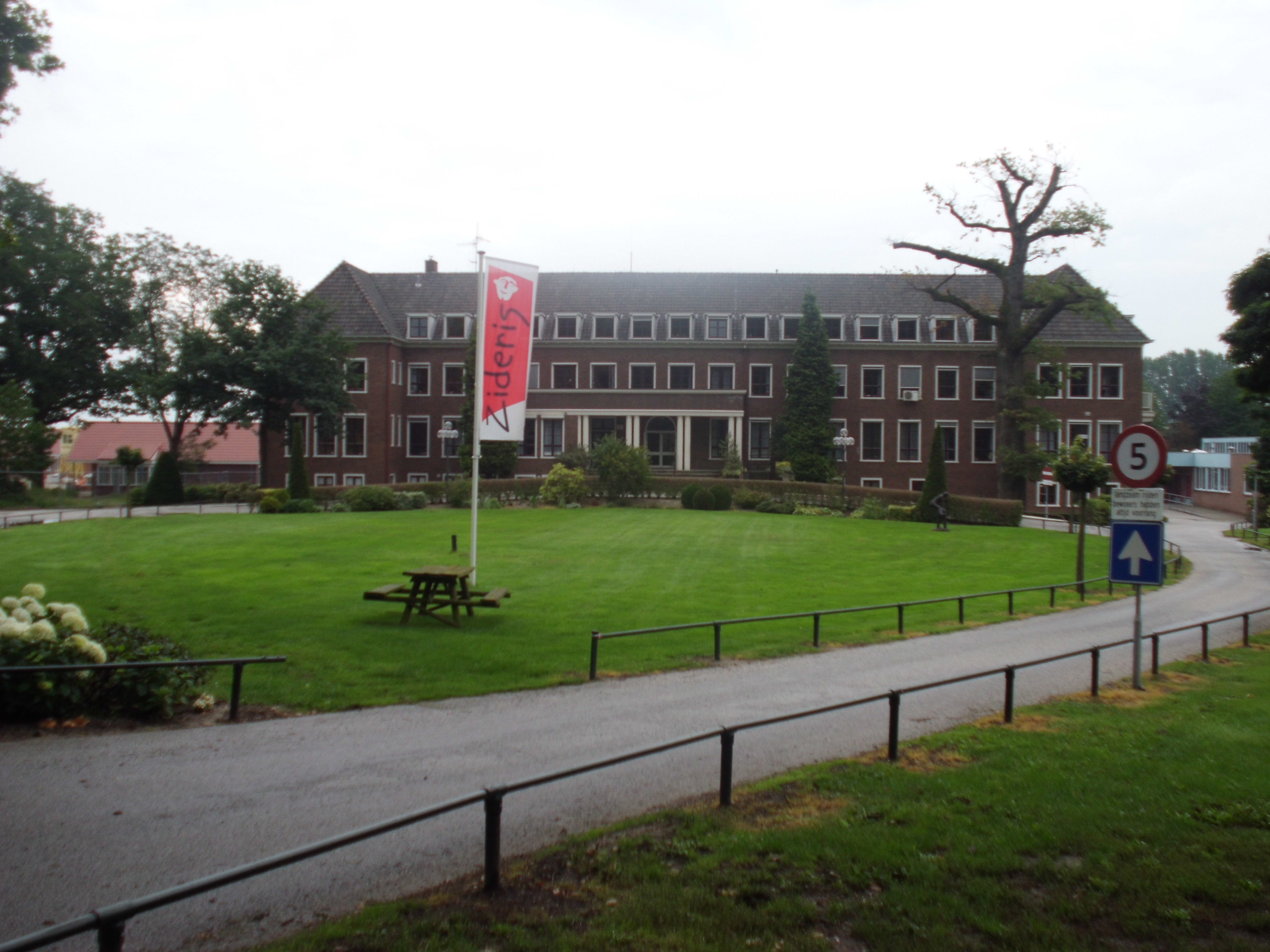 Heimerstein te Rhenen (herbouwd in 1946), in gebruik door Zideris gehandicaptenzorg